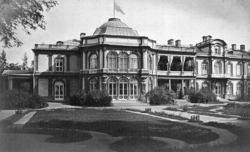 Малый (деревянный) дворец графа Шувалова в Парголово